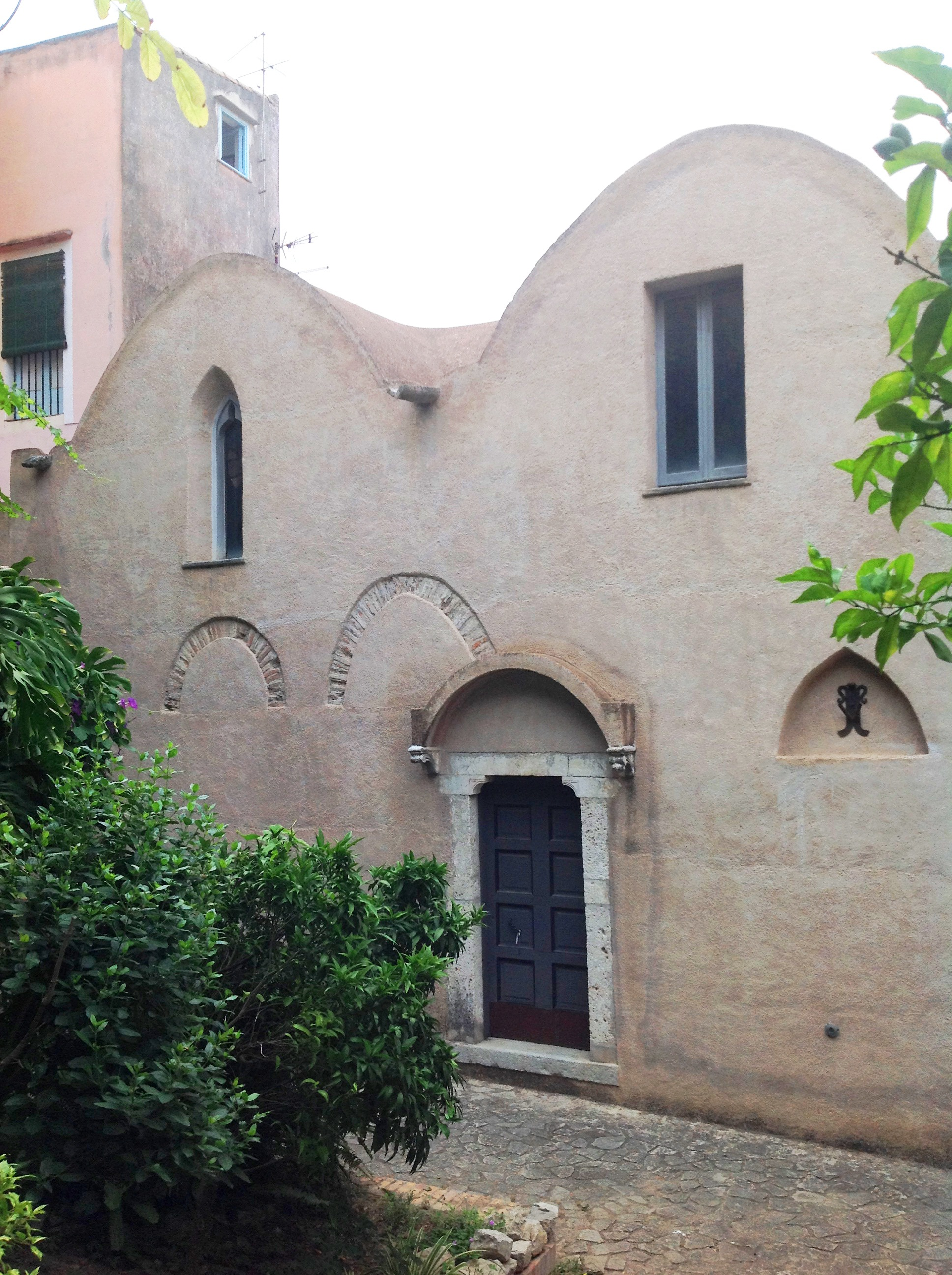 Il semplice esterno in stile catalano dell'ex chiesa di San Giovanni alla Porta in Gaeta (LT)